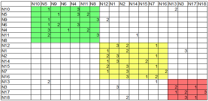 Blockmodellanalyse Schritt2 Modellierung